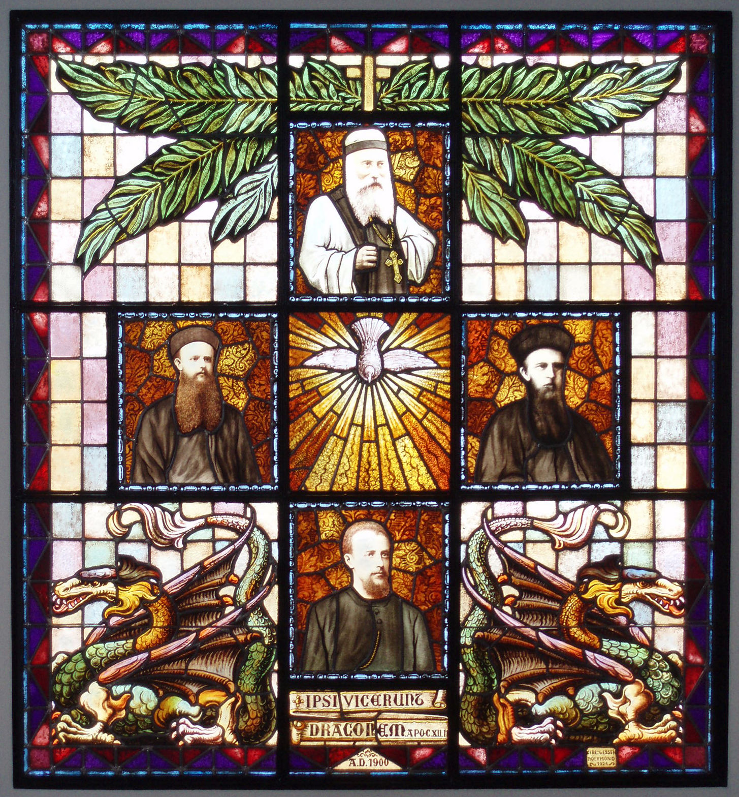 eigen foto (c) looi 2006